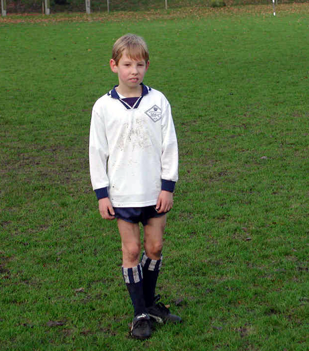 Clubkleding Kon.HFC